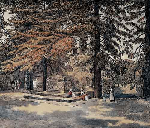 А. Мартынов. Вид гробницы Ахиллеса в саду графа А. С. Строганова. 1813. Фрагмент. Бумага, мягкий лак, раскрашенный акварелью. Из альбома семьи Строгановых